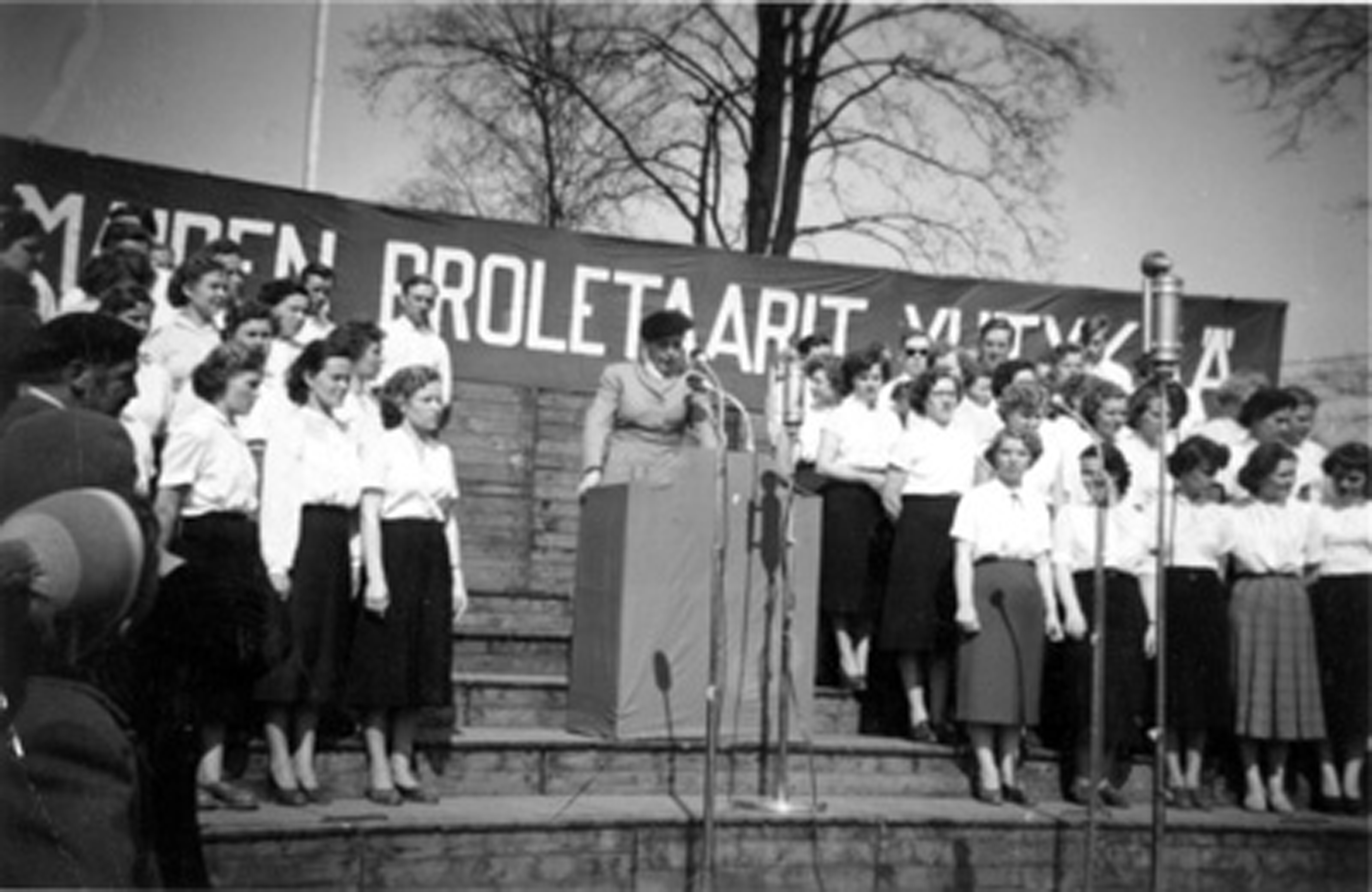 Vappujuhla vuonna 1953 Kaisaniemessä. Koiton Nuorisokuoro ja Hertta Kuusinen